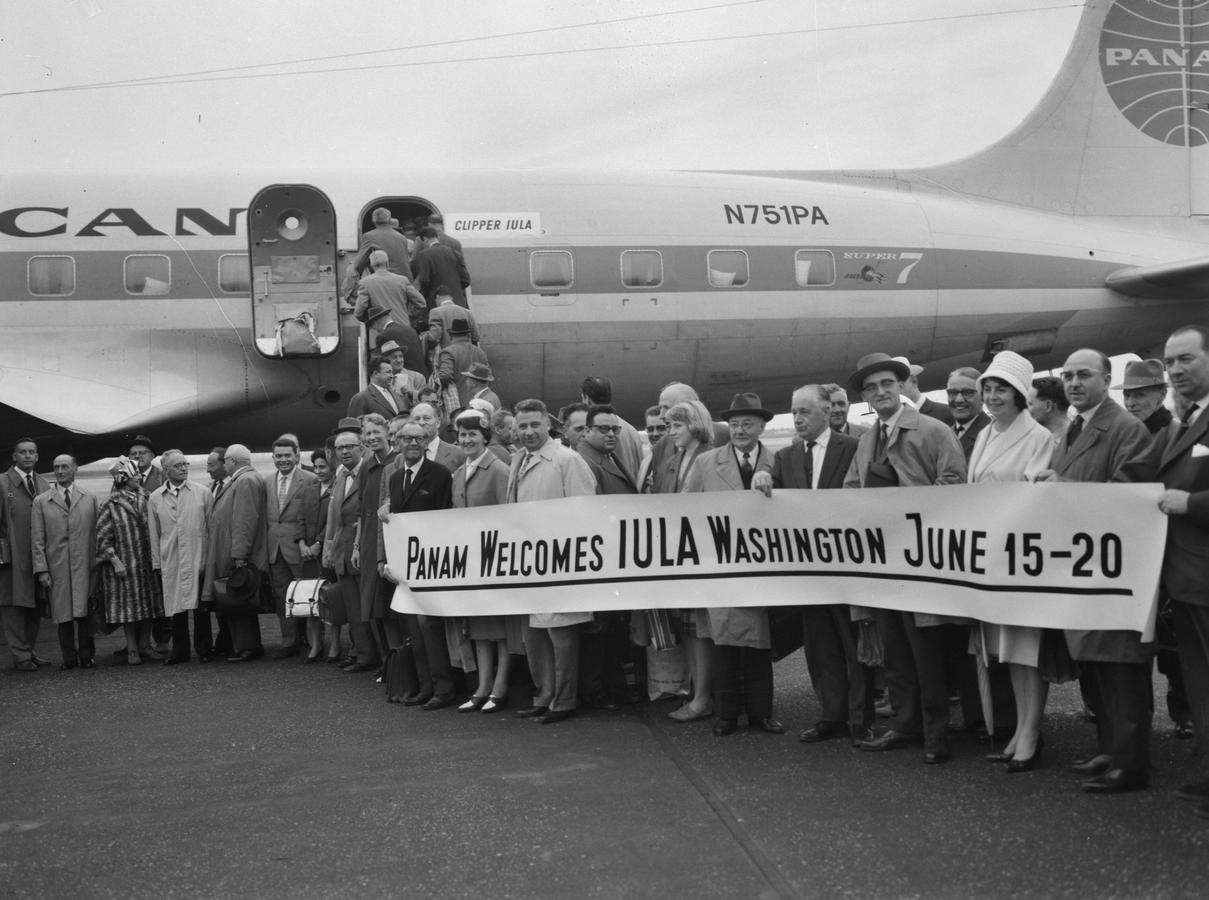 Betreft de burgemeesters van Arnhem, Bergen op Zoom, Delden, Geleen, Gorinchem, Haarlem, Helmond, Nijmegen, Rotterdam en Scheemda (aldus voor vertrek Algemeen Dagblad, 25 mei 1961). Collectie / Archief : Fotocollectie Anefo Reportage / Serie : [ onbekend ] Beschrijving : Vertrek 10 burgemeesters naar Amerika. Vertrek van het gezelschap Datum : 12 juni 1961 Locatie : Amerika Trefwoorden : BURGEMEESTERS, gezelschappen, vertrekken Fotograaf : Bilsen, Joop van / Anefo Auteursrechthebbende : Nationaal Archief Materiaalsoort : Negatief (zwart/wit) Nummer archiefinventaris : bekijk toegang 2.24.01.04 Bestanddeelnummer : 912-5901